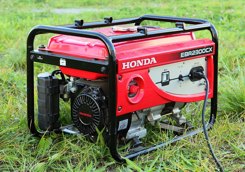 Honda EBR2300CX gasoline generator.